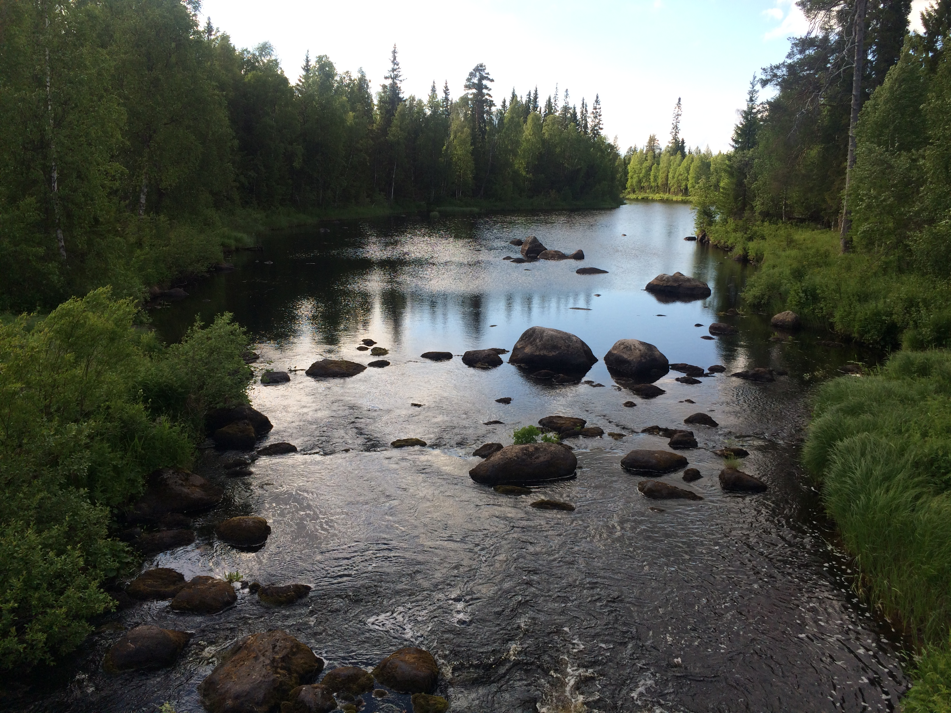 Кумбукса (приток Вожмы)